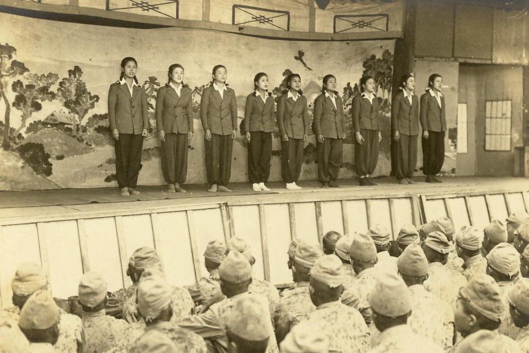 戦時中の慰問？